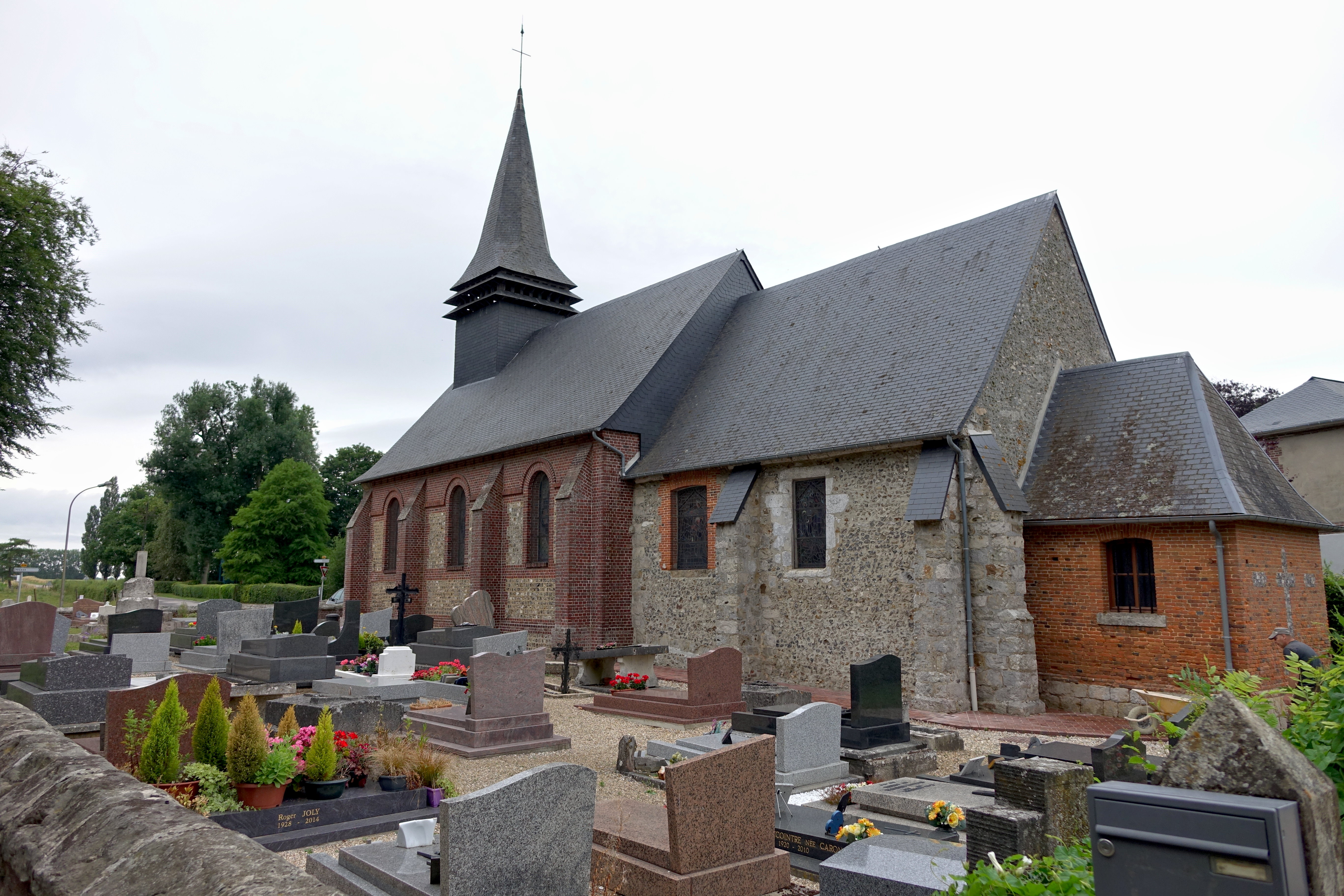 Église de La Vieux-Rue, Seine-Maritime, France